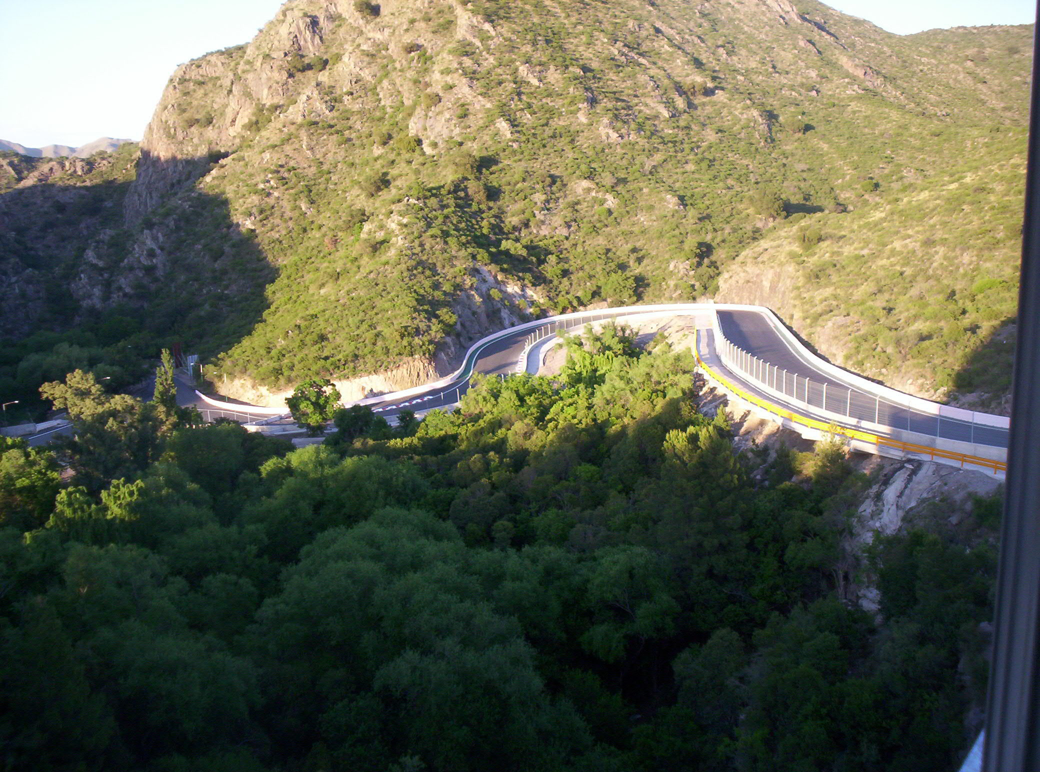 Circuito de Fórmula 1 -Potrero de los Funes San Luis